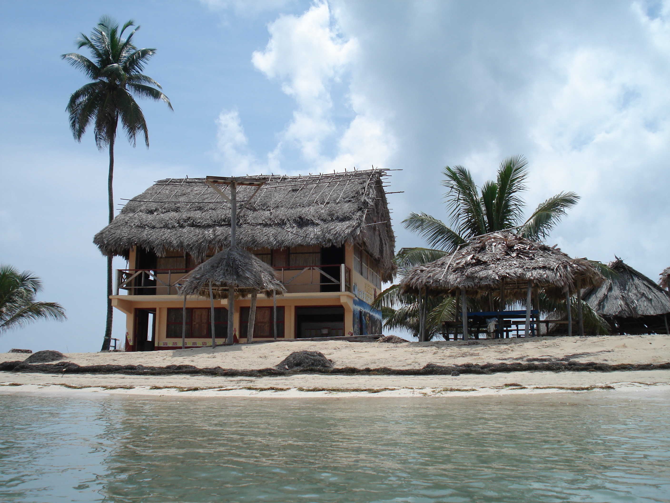 El Museo de la Nación Guna en El Porvenir